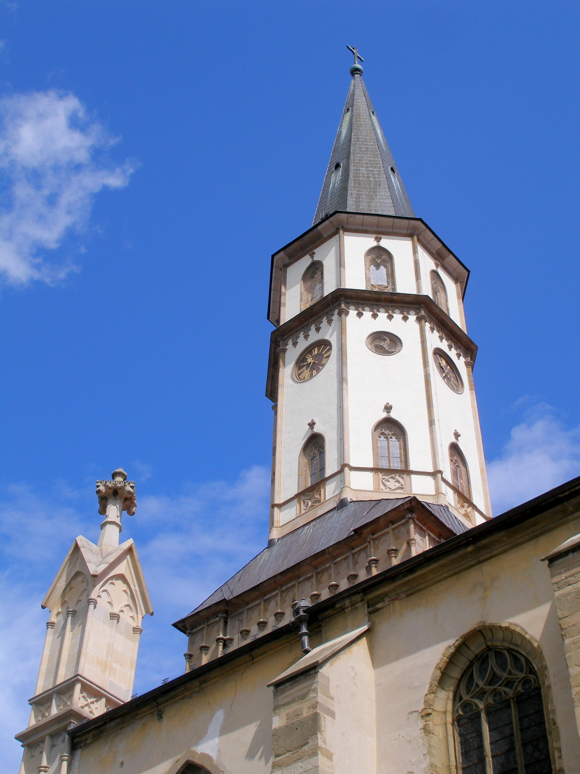 Chrám svätého Jakuba v meste Levoča. Okres Levoča.región Spiš.